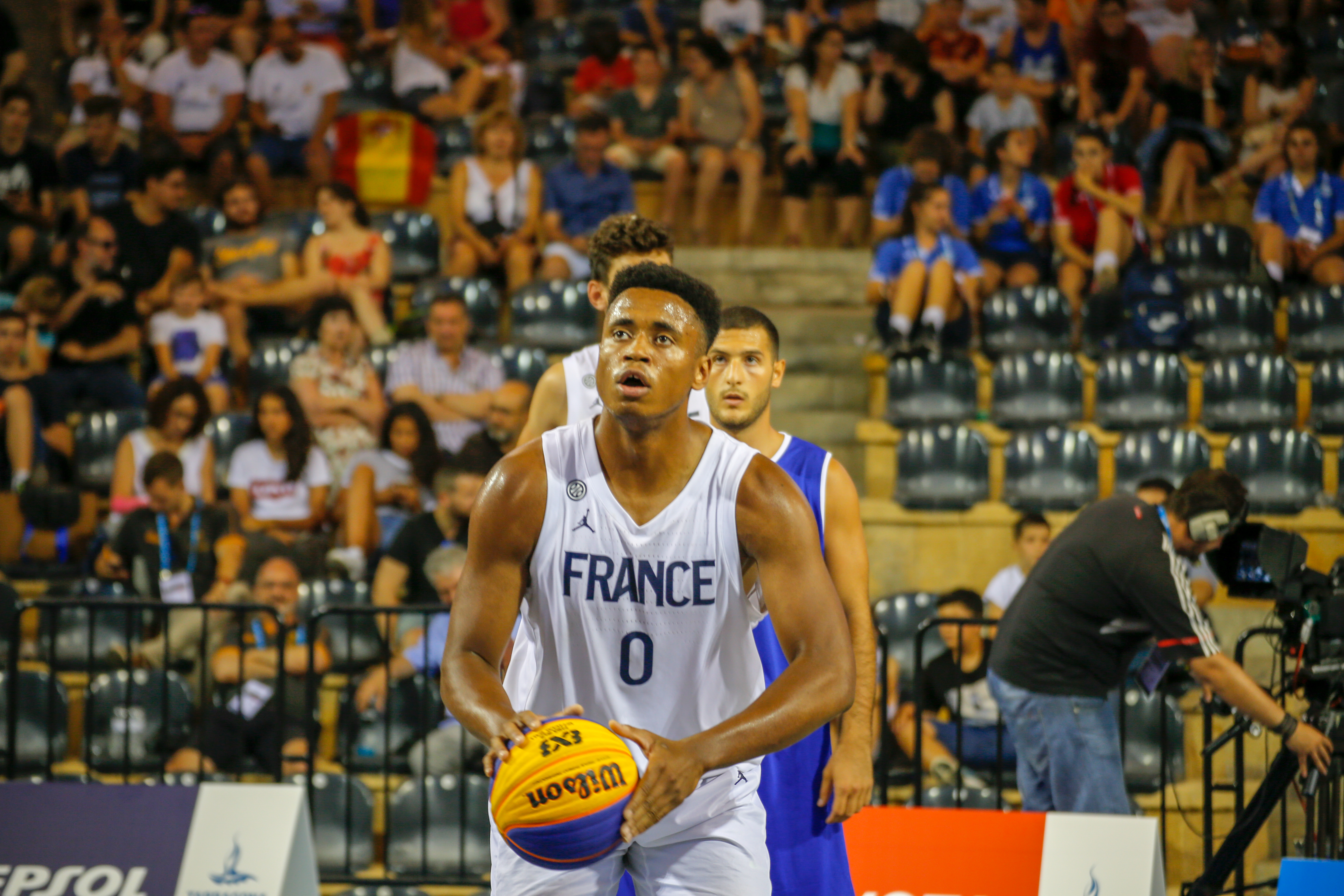 Jim Seymour en los Juegos del Mediterráneo 2018